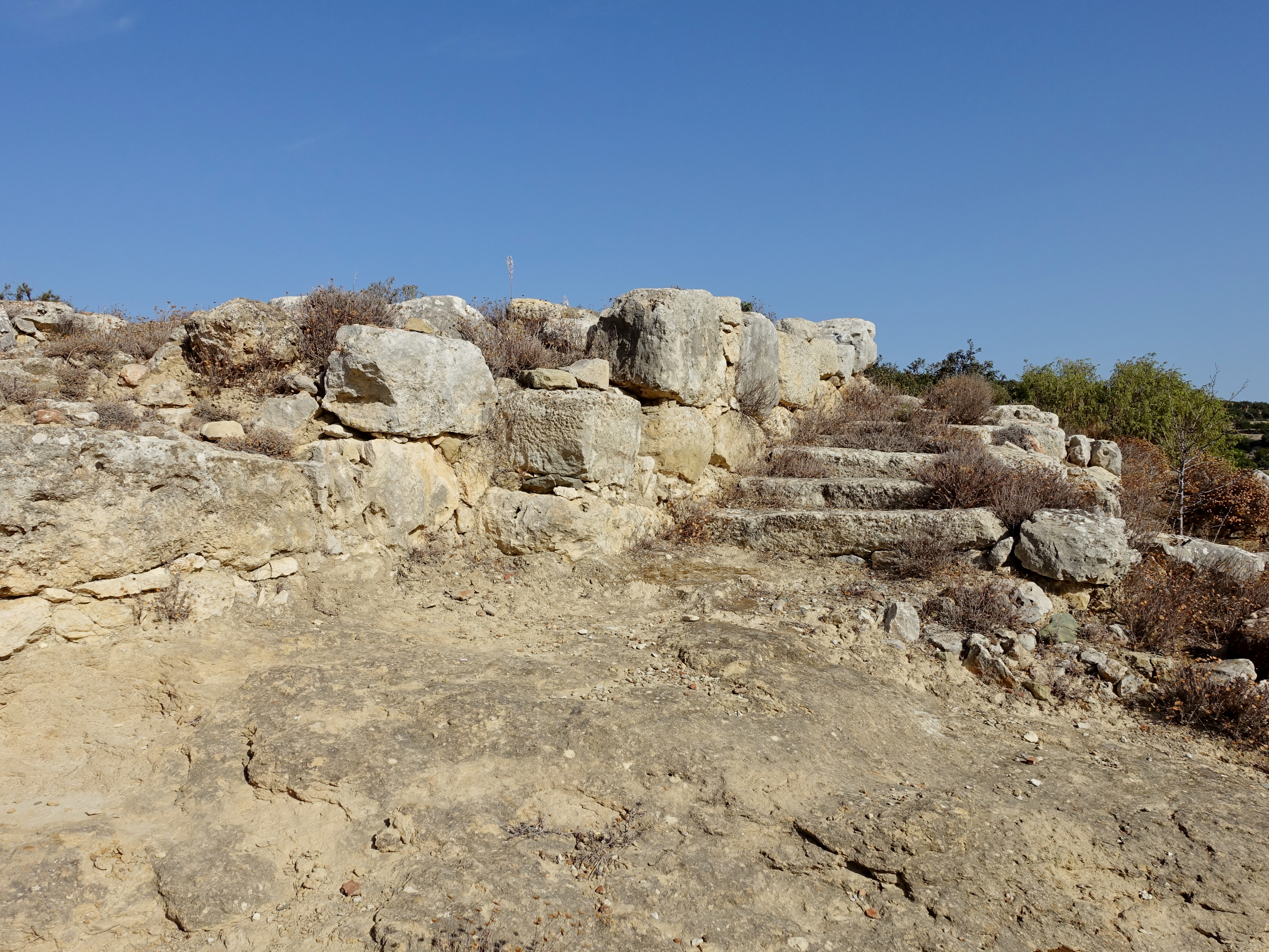 Minoischen Villa von Agios Georgios (Άγιος Γεώργιος), Gemeinde Sitia, Kreta, Griechenland